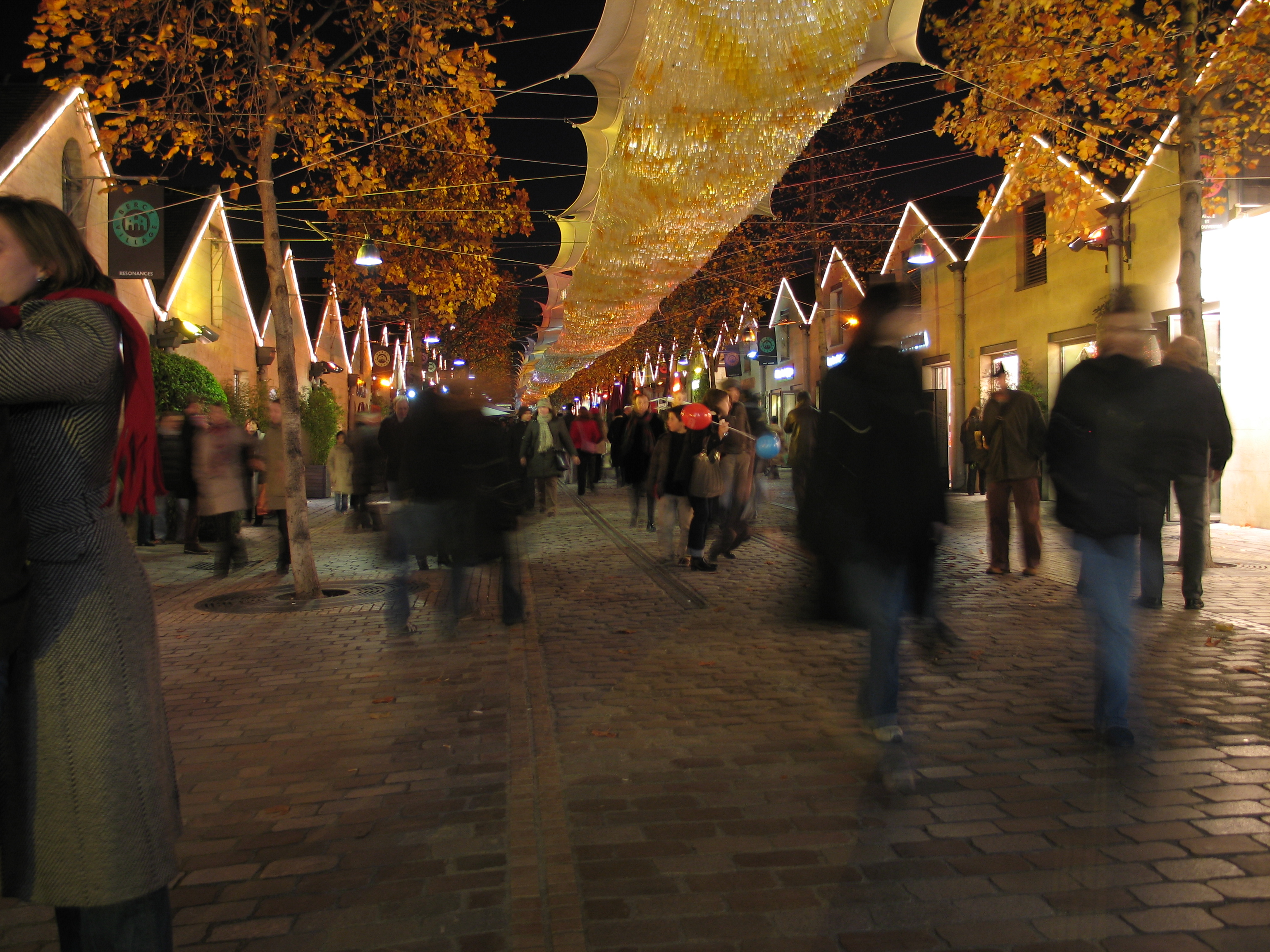 Paris (Île-de-France, France) : Cour Saint-Émilion à Bercy Village.